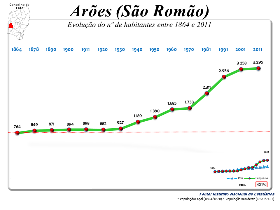 Censos 1864/2011